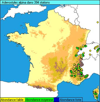 Alpine Plantain dispatching map in France (Adenostyles alpina), originating of the internet site The accord of the autor, H. Brisse, is here. Carte de répartition d'Adénostyle des Alpes en France (Adenostyles alpina), issue du site internet L'accord de l'auteur, H. Brisse, se situe ici.